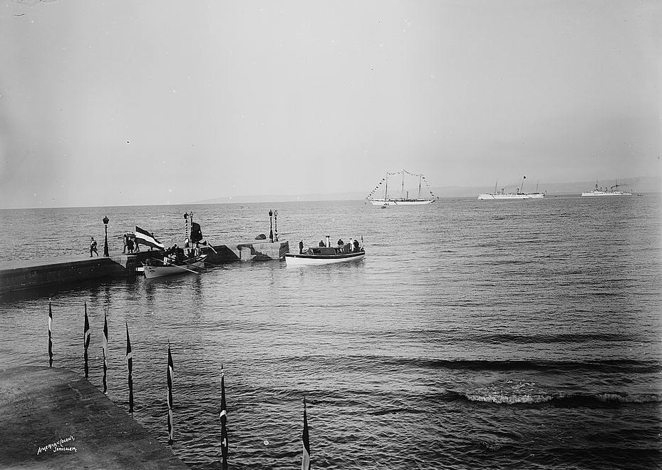 The German emperor Wilhelm II debarking at Haifa on 25 October 1898. The center ship is his yacht SMY Hohenzollern. הקיסר הגרמני וילהלם השני מגיע לחיפה ב -25 באוקטובר 1898. הספינה האמצעית היא היאכטה שלו "סמי הוהנצולרן".